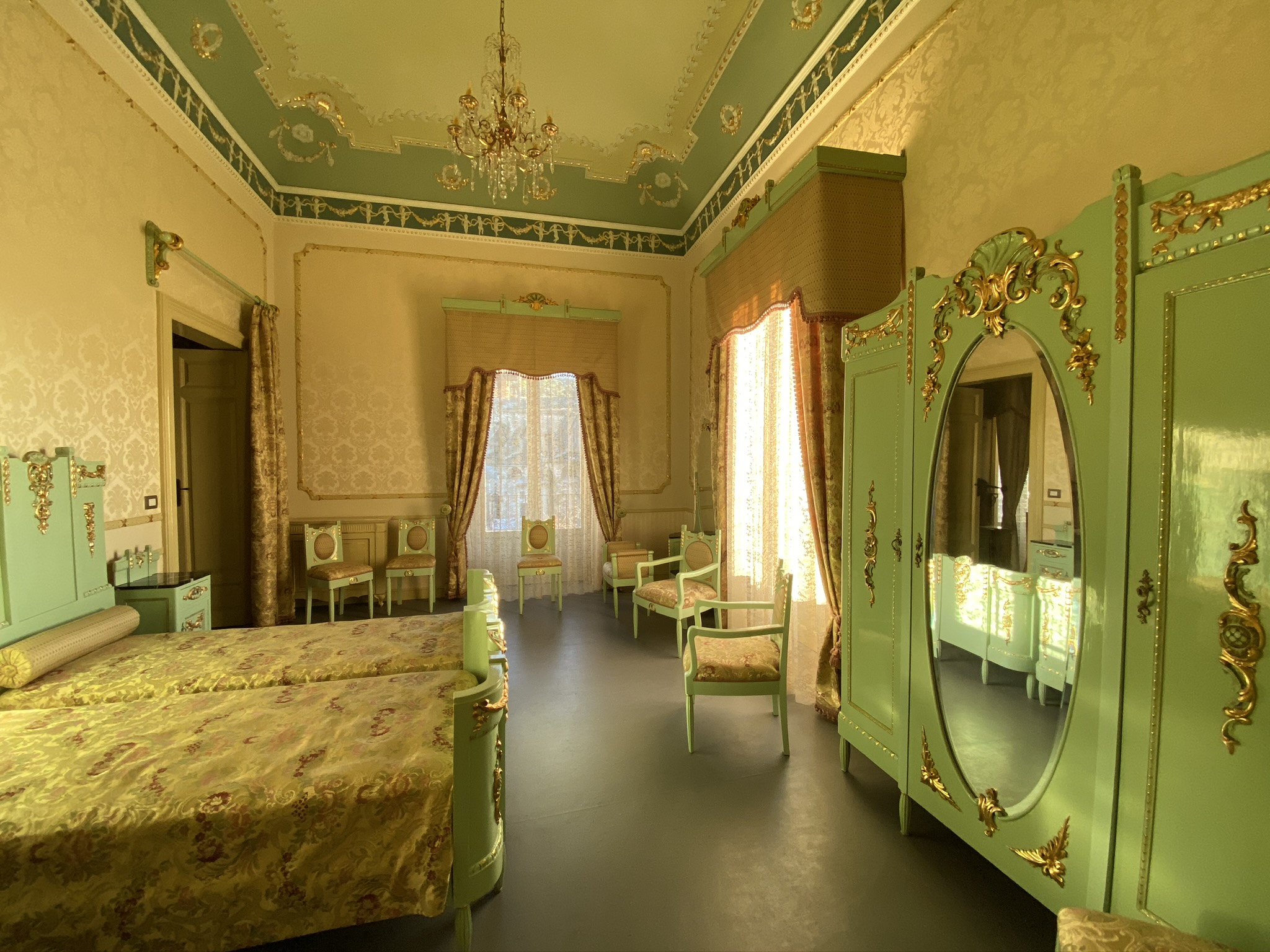 Palazzo Bonelli Patanè 2